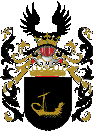 Vytvořeno s ohledem na slovní zápis udělení hodnosti a erbu z roku 1855, do heraldického vzoru. pracovní verze